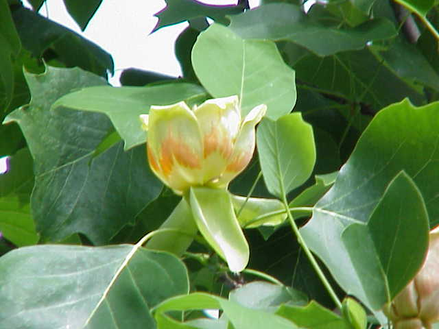 Species: Liriodendron tulipifera Family: Magnoliaceae Image No. 2